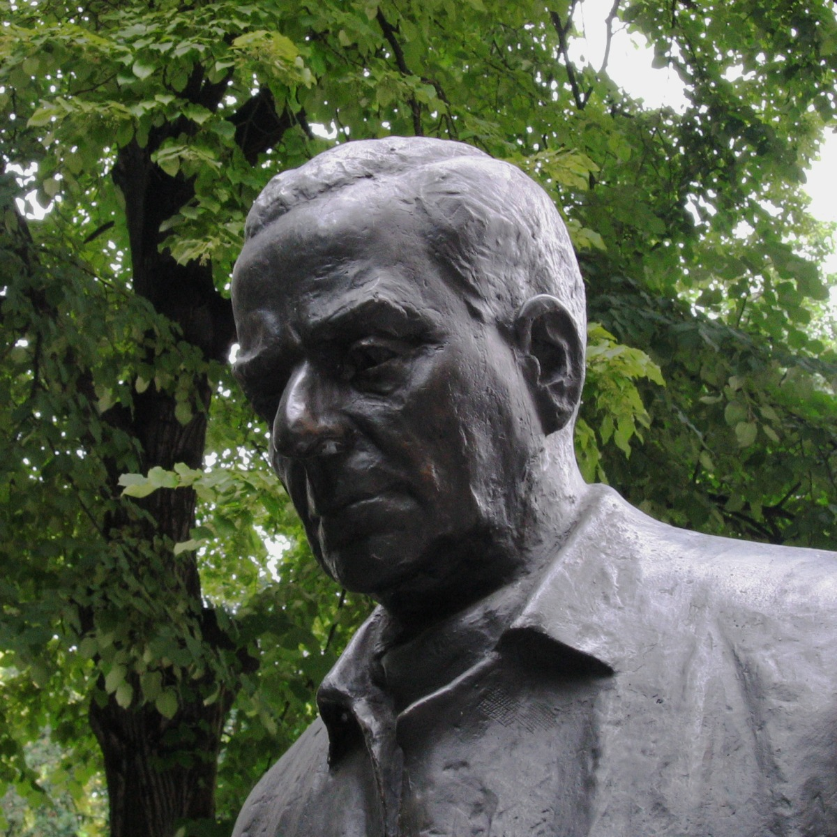 en: Statue of Ivo Andrić in Belgrade de: Denkmal für Ivo Andrić in Belgrad